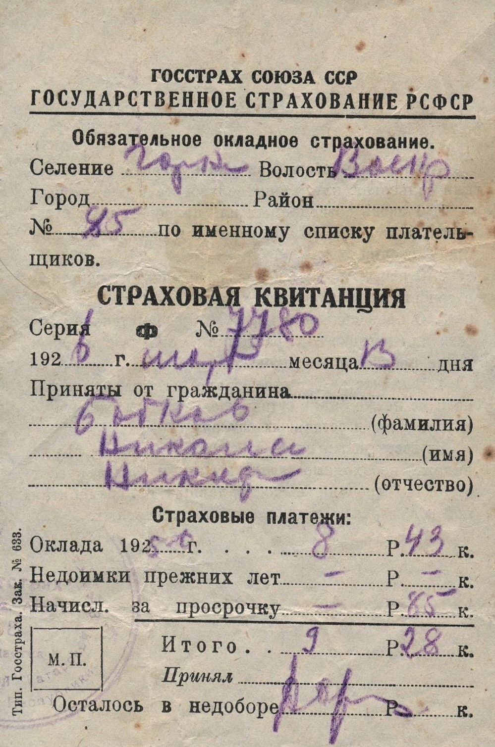 Страховая квитанция жителя деревни Горки (Арский кантон, Воскресенская волость) Николая Никифоровича Бобкова (1926 год)